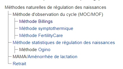 Matrice de dénomination des "méthodes naturelles"